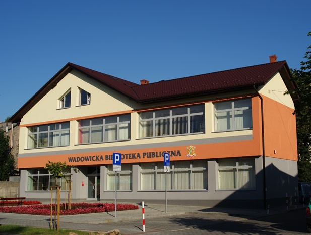 Główny budynek Wadowickiej Biblioteki Publicznej przy ul. Legionów 1 po remoncie w 2008 roku.